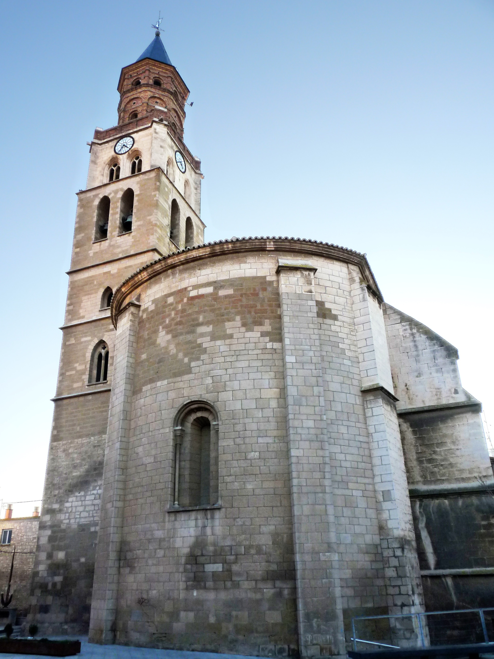 Fraga - Iglesia de San Pedro - Vista del ábside y la torre